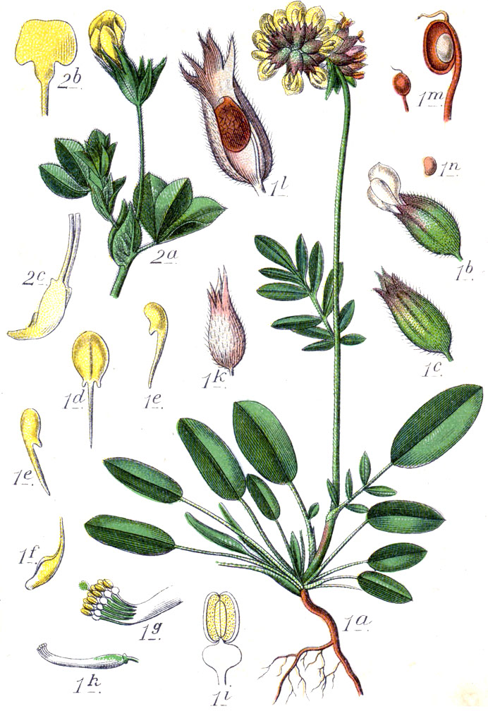 1. Anthyllis vulneraria L. s. l. 2. Tetragonolobus maritimus (L.) Roth, syn. Lotus maritimus L., Lotus siliquosus L. , nom. illeg. Original Caption 1. Wundklee, Anthyllis vulneraria 2. Schotenklee, Lotus siliquosus